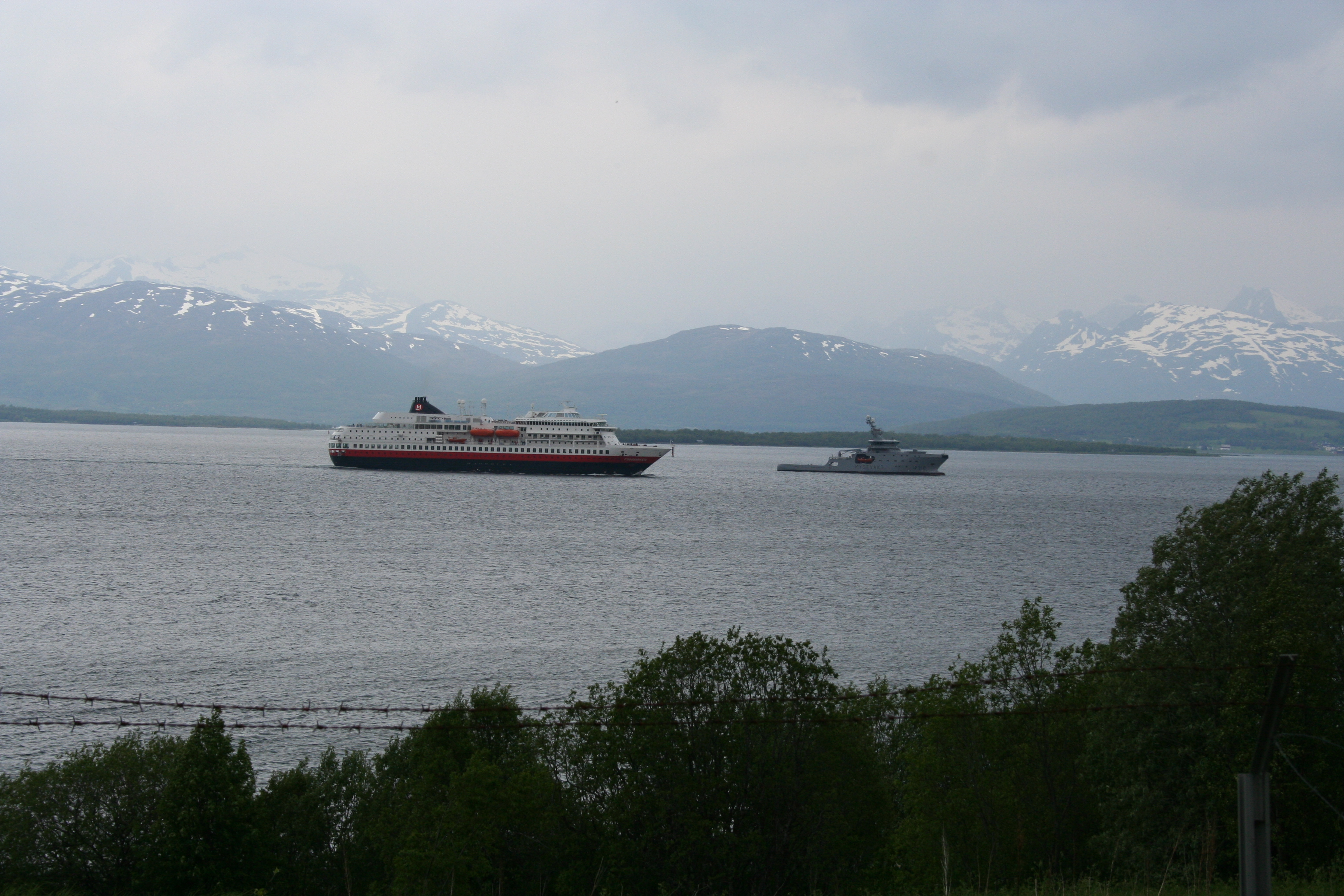 Norwegian coastguard KV Harstad meets coastal steamer M/S Finnmarken outside Tromsø, 11 june 2006.